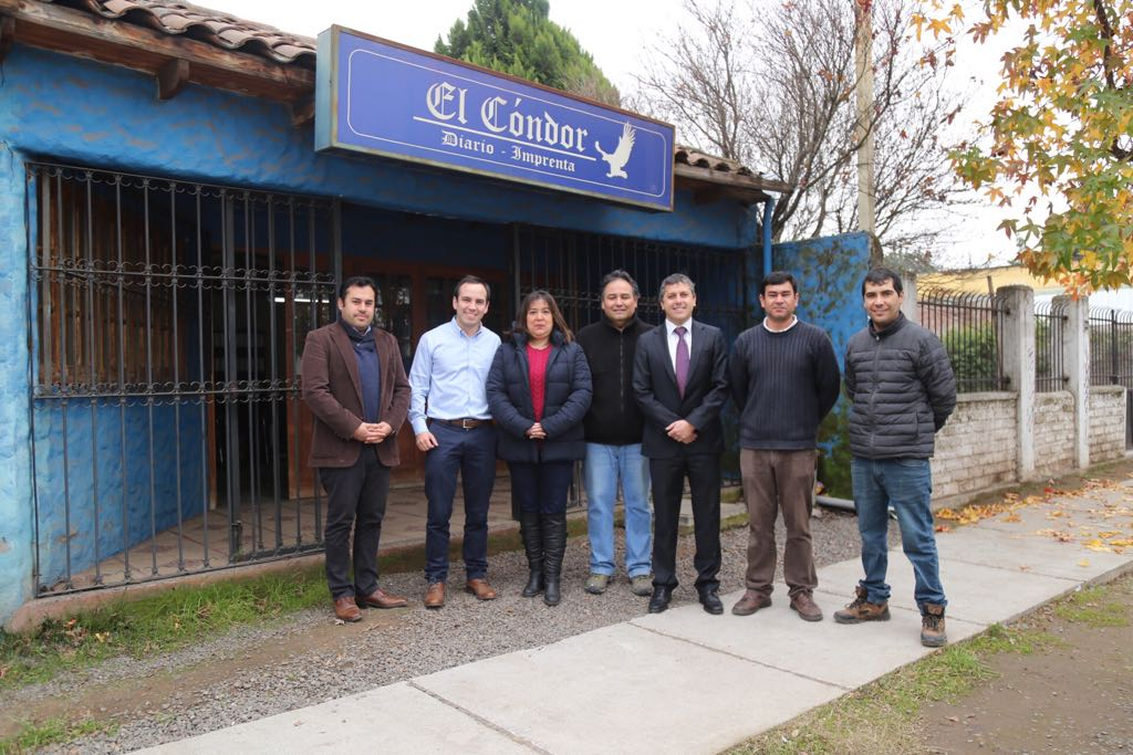 OHiggins: Intendente @juanmasferrer visita el Diario "El Cóndor" de #SantaCruz, tradicional medio escrito que desde el año 1917 informa a esta comuna y la provincia de #Colchagua. ChileLoHacemosTodos @ Santa Cruz, Chile